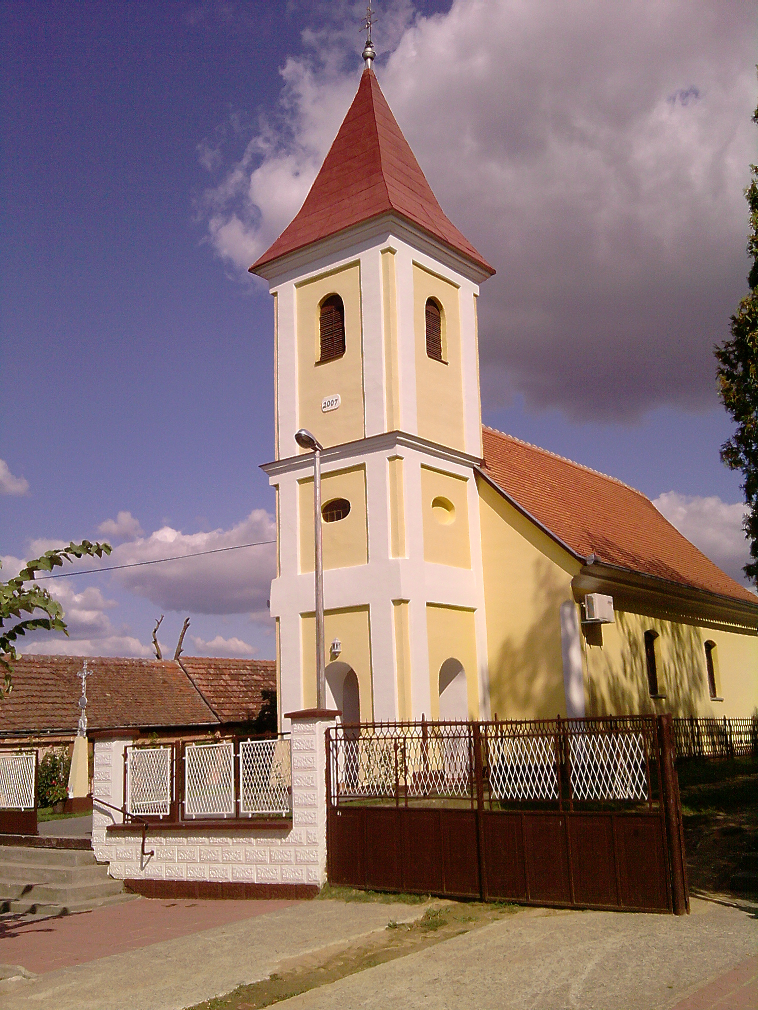 Crkva u Vukojevcima